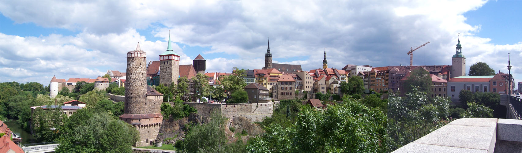 Blick von der Friedensbrücke auf die Altstadt von Bautzen. Hornjoserbsce: Wid wot Mosta měra do stareho města Budyšina.